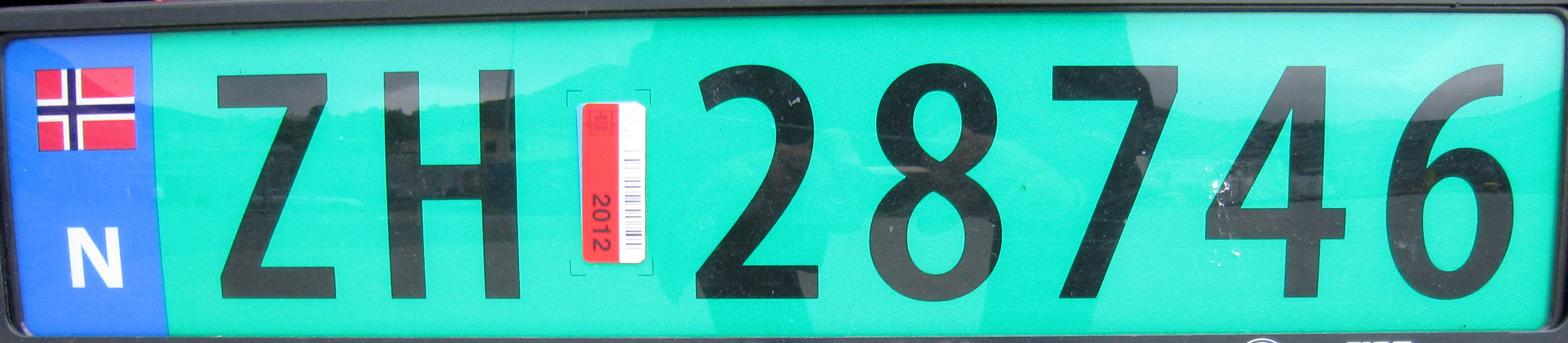 Noorwegen kenteken groen nieuw